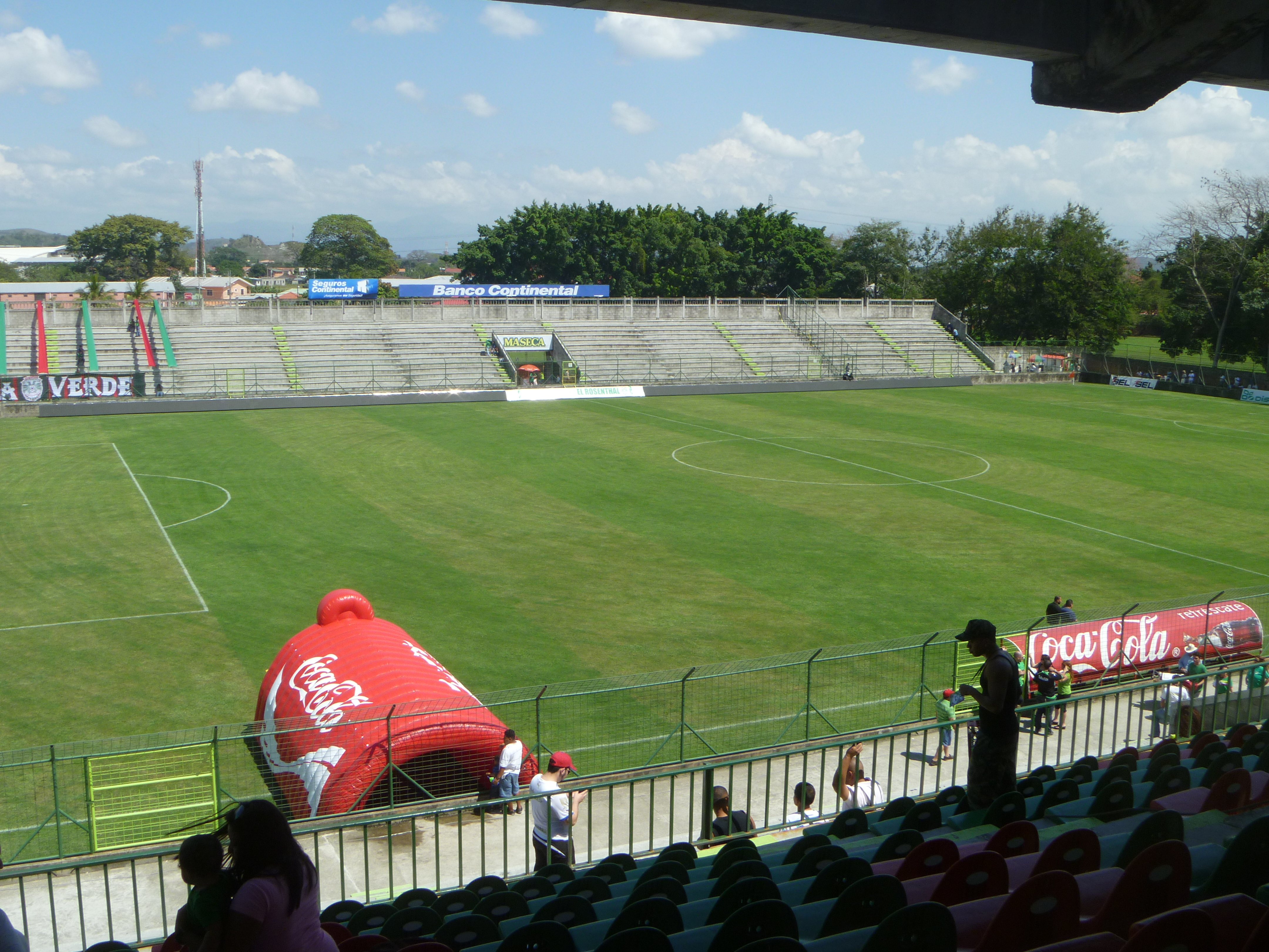 Graderia del estadio yankel rosenthal desde silla